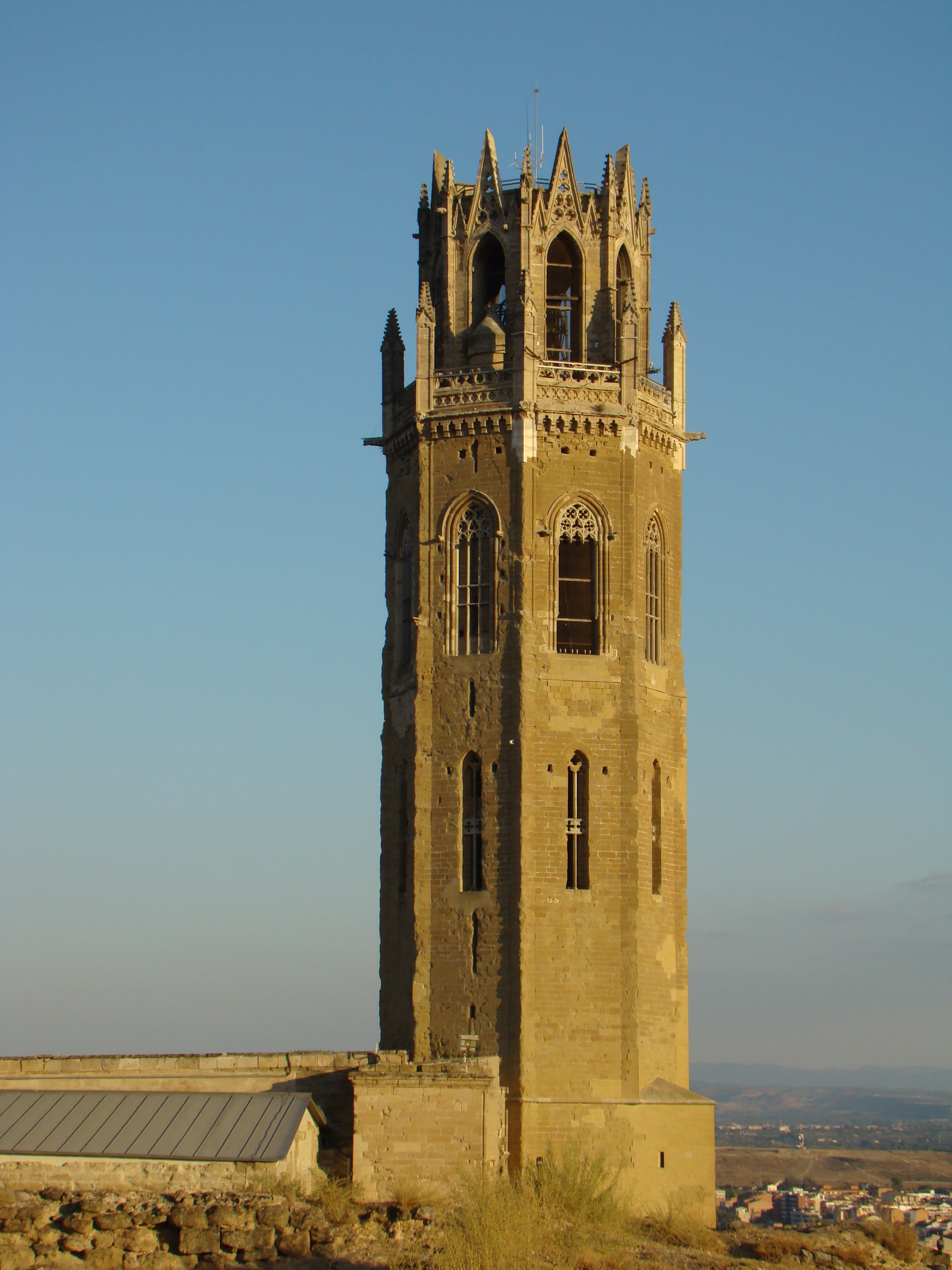 BCIN 144-MH